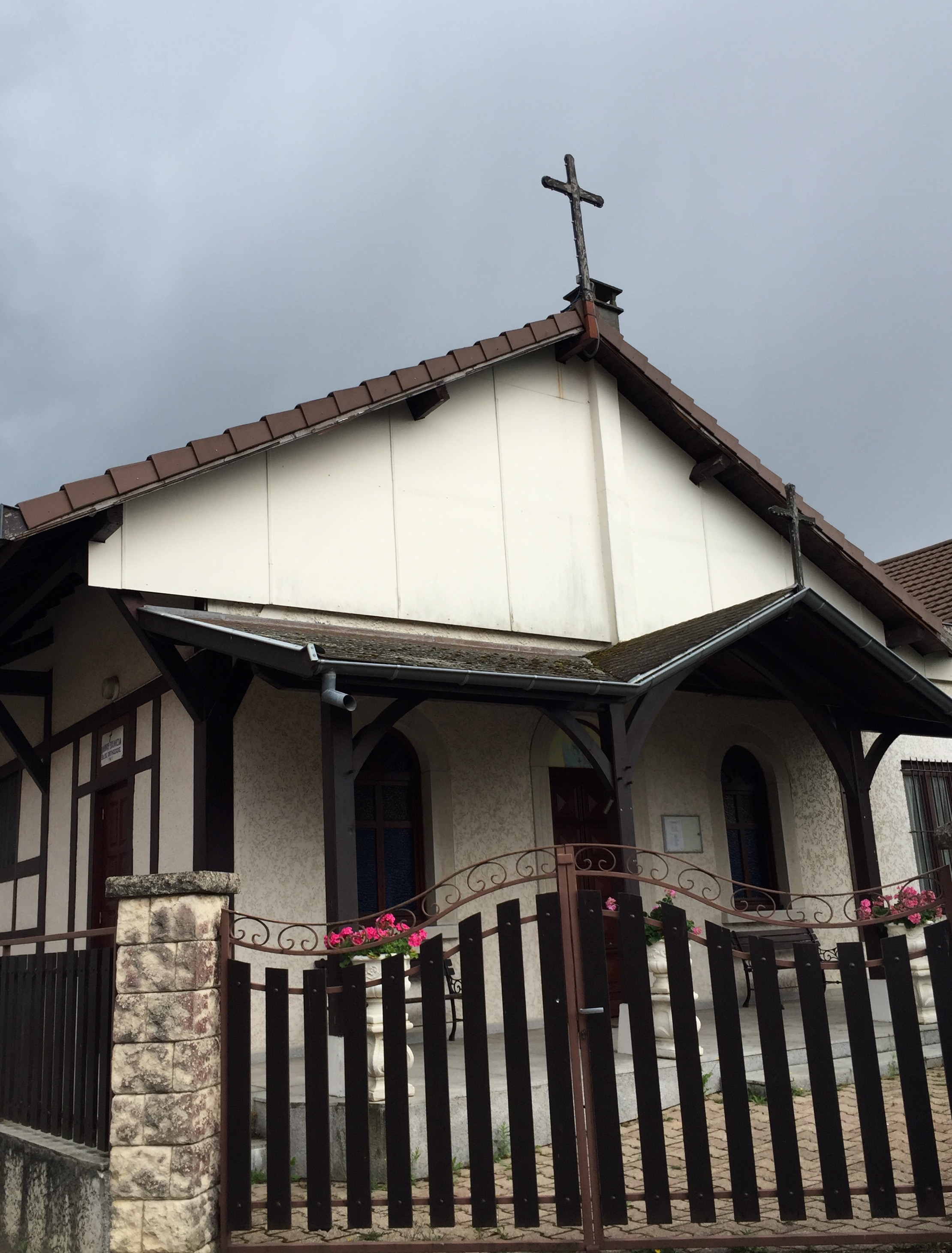 Église orthodoxe grecque Saint-Alexandre, Le Réveil, Charvieu-Chavagneux, France.